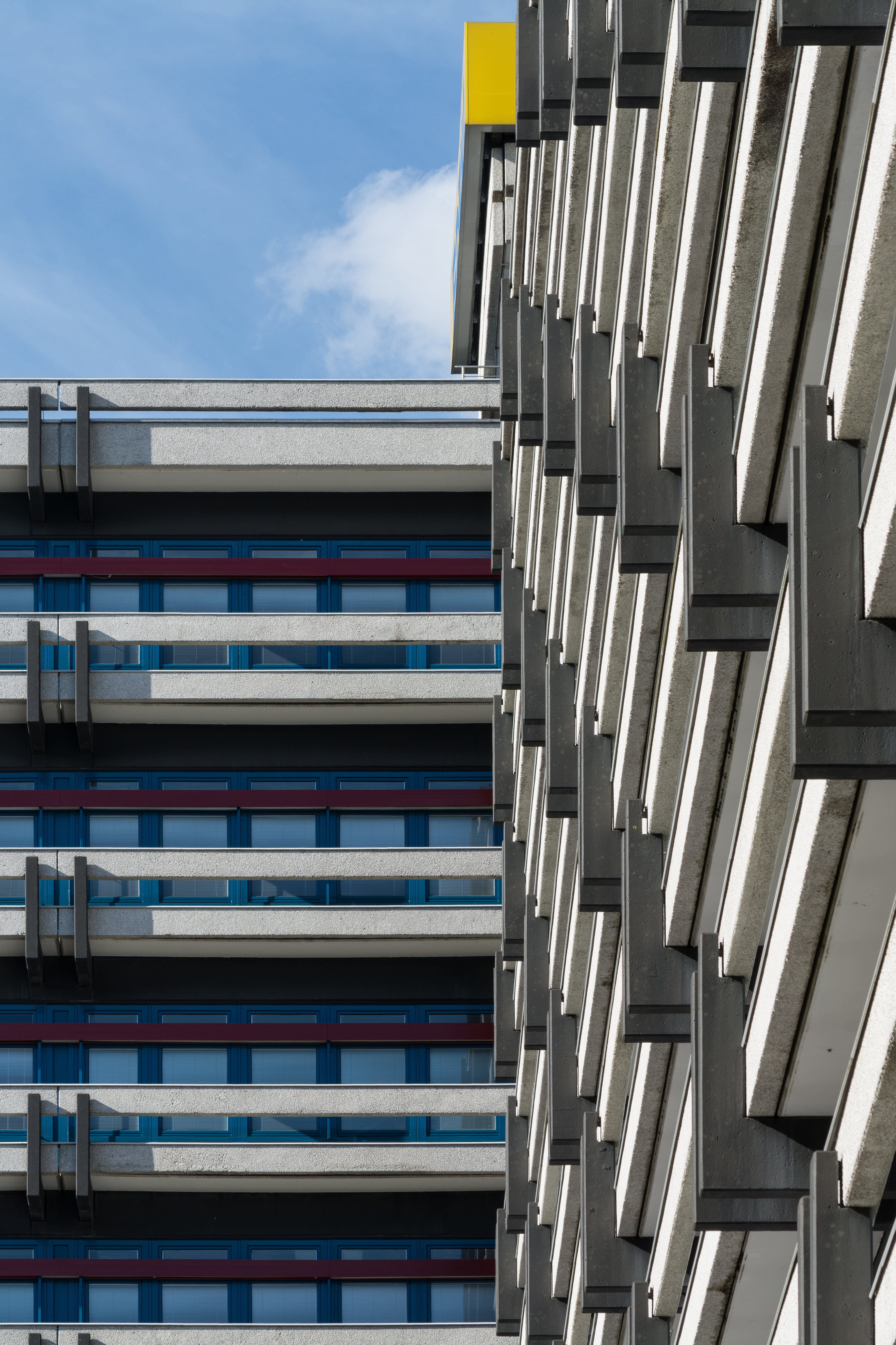 Bürohaus New-York-Ring 6, 6a in Hamburg-Winterhude, Fassadendetail. This is a photograph of an architectural monument.